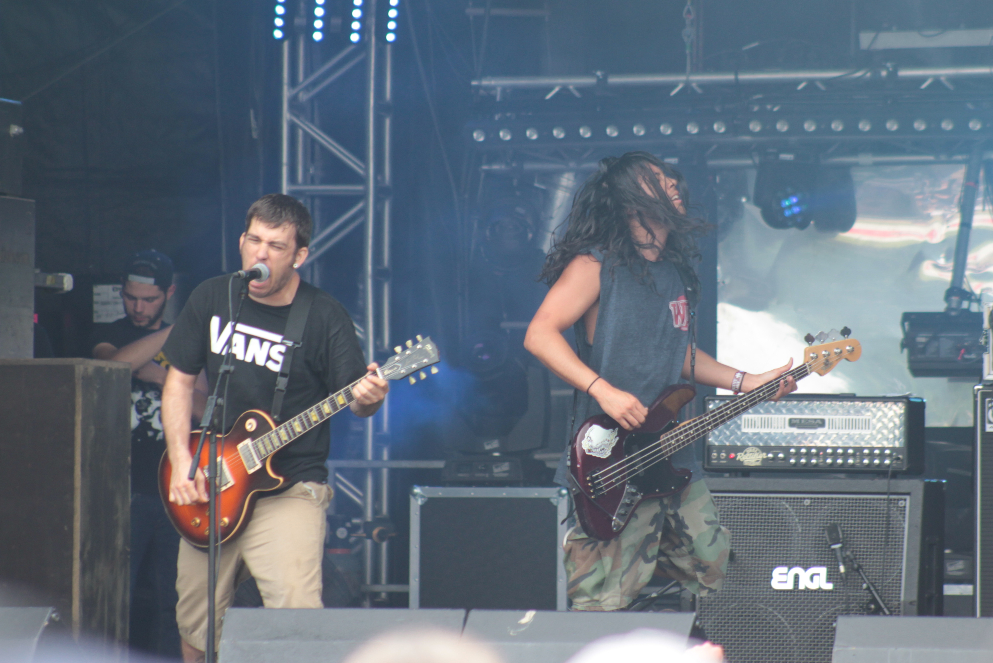 Aaron Dalbec et Brendan Maguire,Bane, Helfest 2013, Fr-44-Clisson.